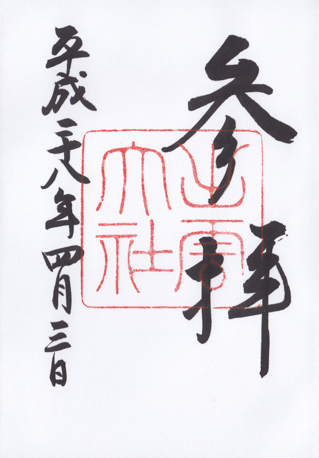 日本岛根县出云大社所授予的一张御朱印。